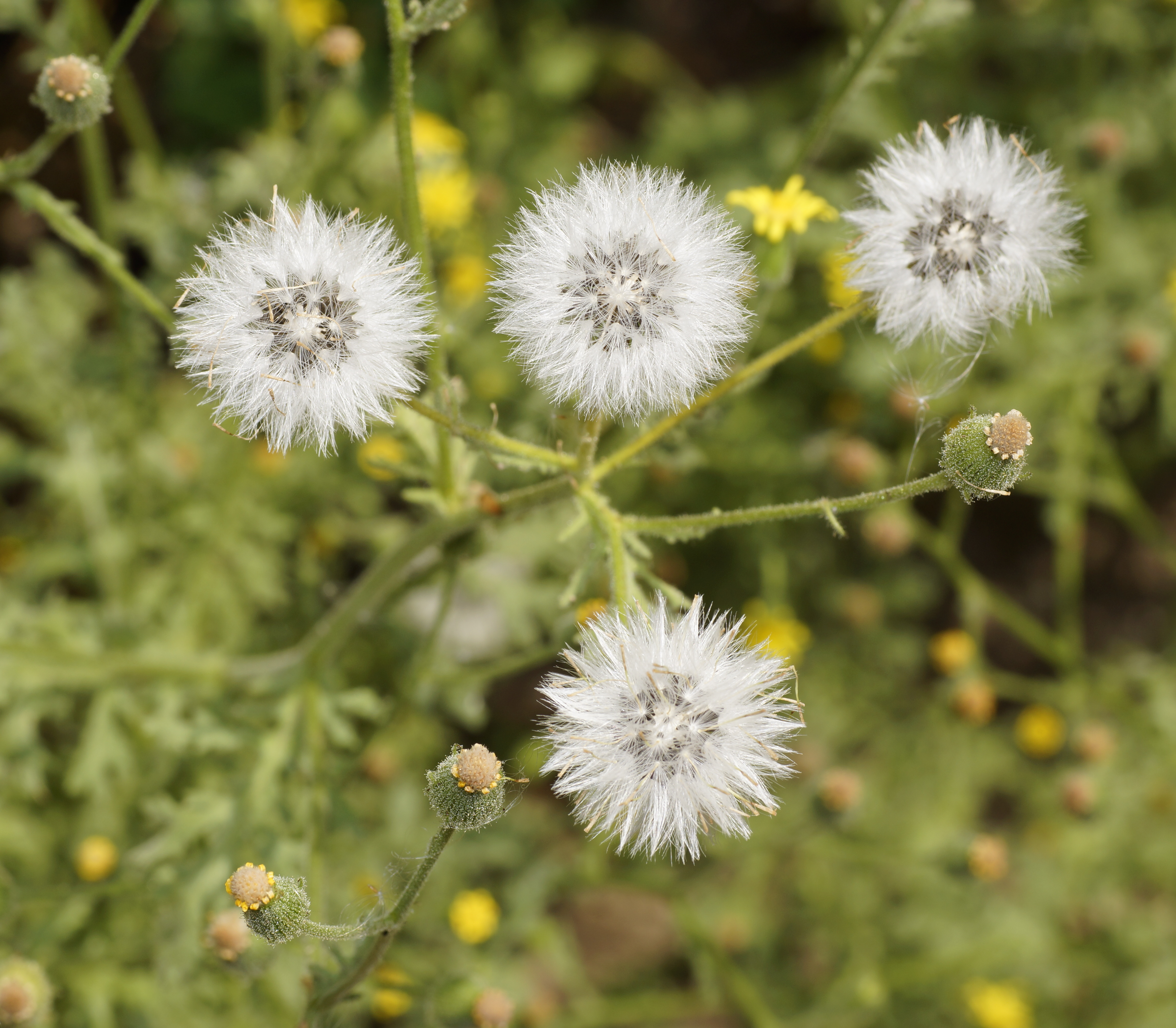 Klebriges Greiskraut, Asteraceae, Deutschland, Bayern, Oberfranken, Selbitz Foto: U.Schmidt, 27.VII.2012